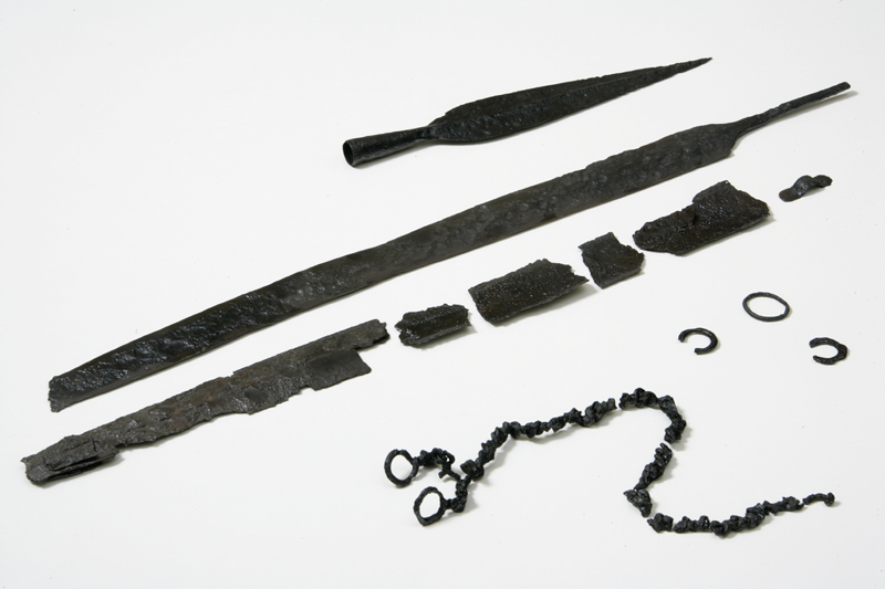 Corredo di tomba di guerriero, rinvenuta nel 1933 da Carlo Bianchessi, costituito dalle sue armi in ferro: la spada conserva parte del fodero e la catena porta spada per fissarla alla vita. Completa l'armamento una punta di lancia di tipo foliato con costolatura mediana.